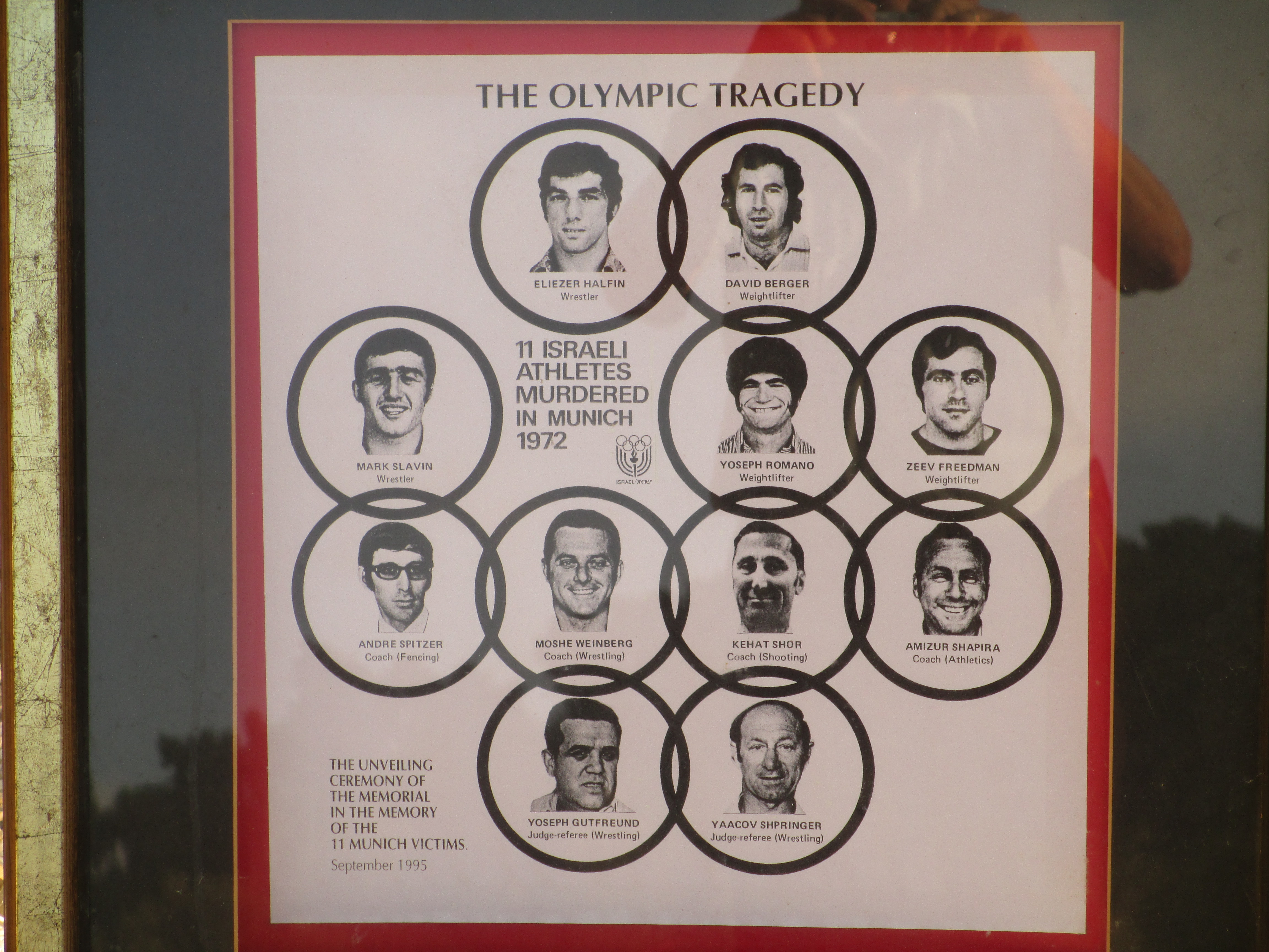 י"א הספורטאים שנרצחו באולימפיאדת מינכן